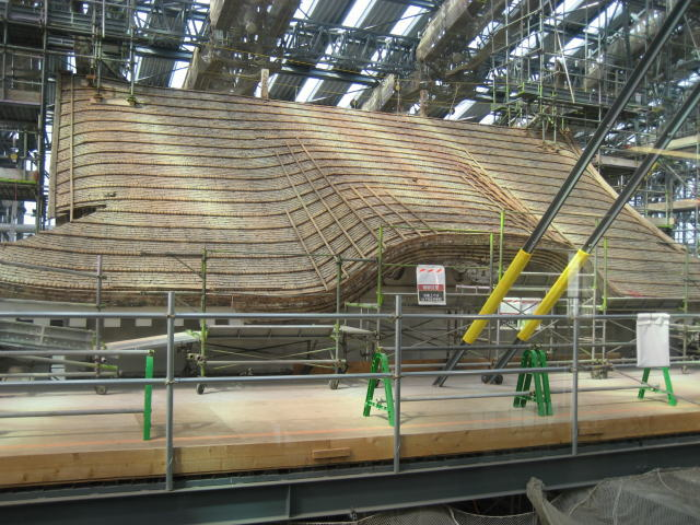 姫路城「平成の修理」屋根部分（２０１１年８月）